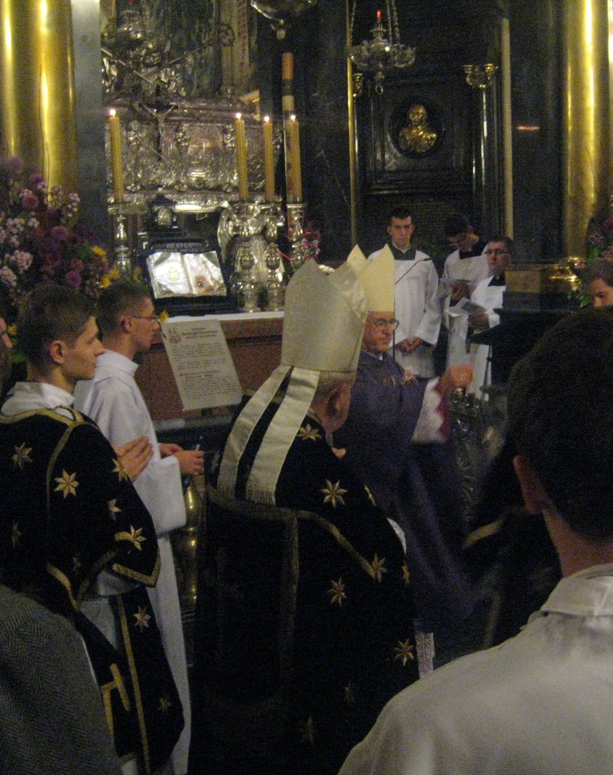 Zaduszki na Wawelu